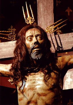 Escultura del Cristo de Mayo en la Igelsia de San Agustín en Santiago de Chile